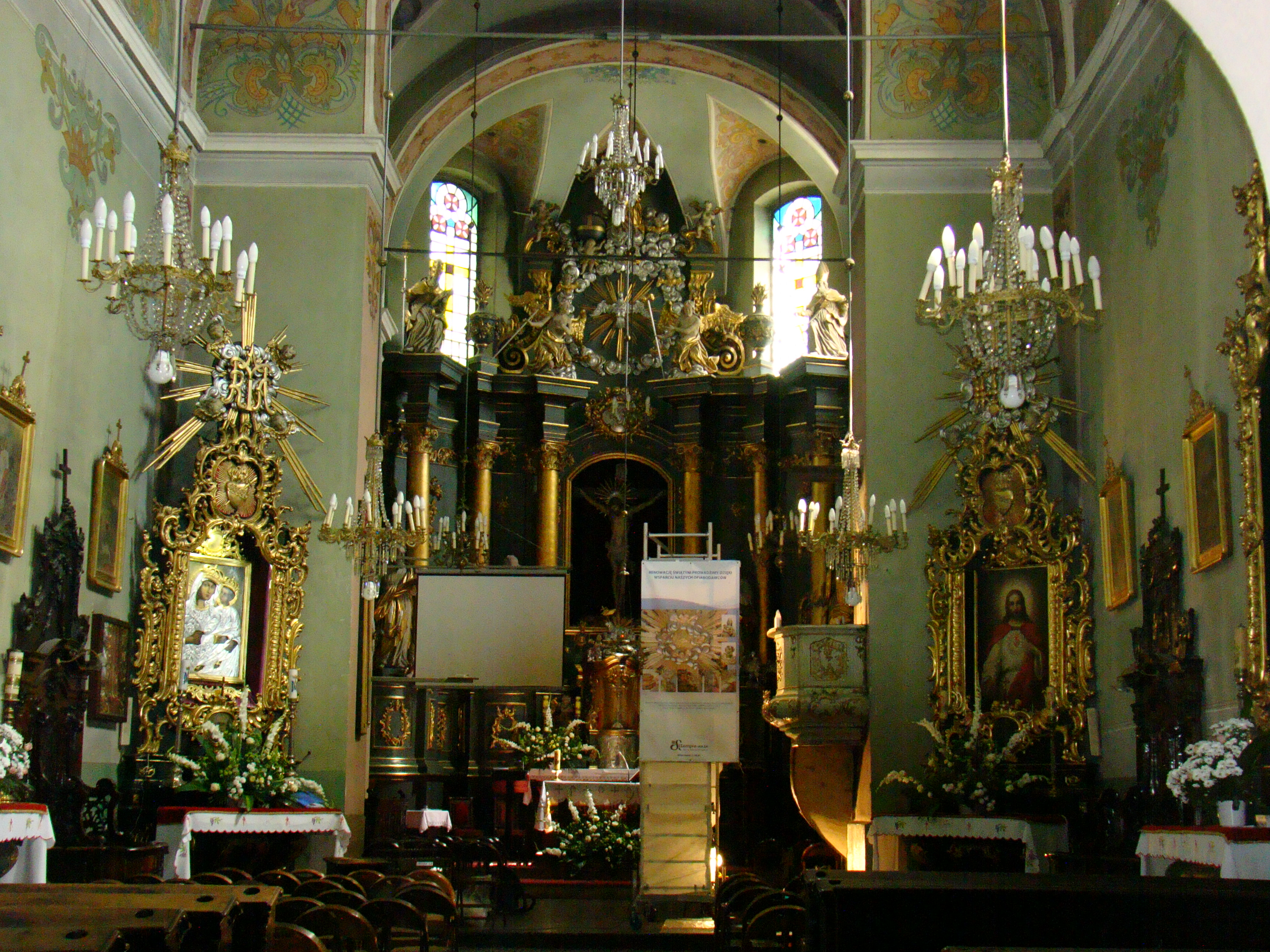 Radomsko, kościół p.w. Podwyższenia Krzyża, 1328, XVIII